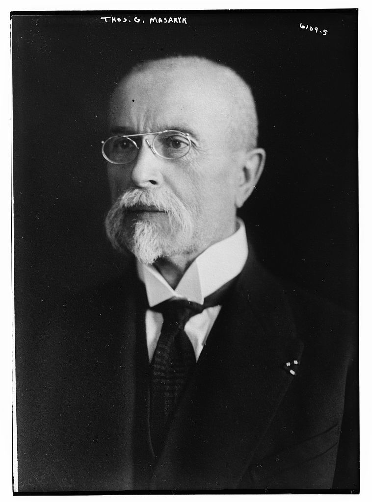 Retrato del político checoslovaco Thomas Masaryk.